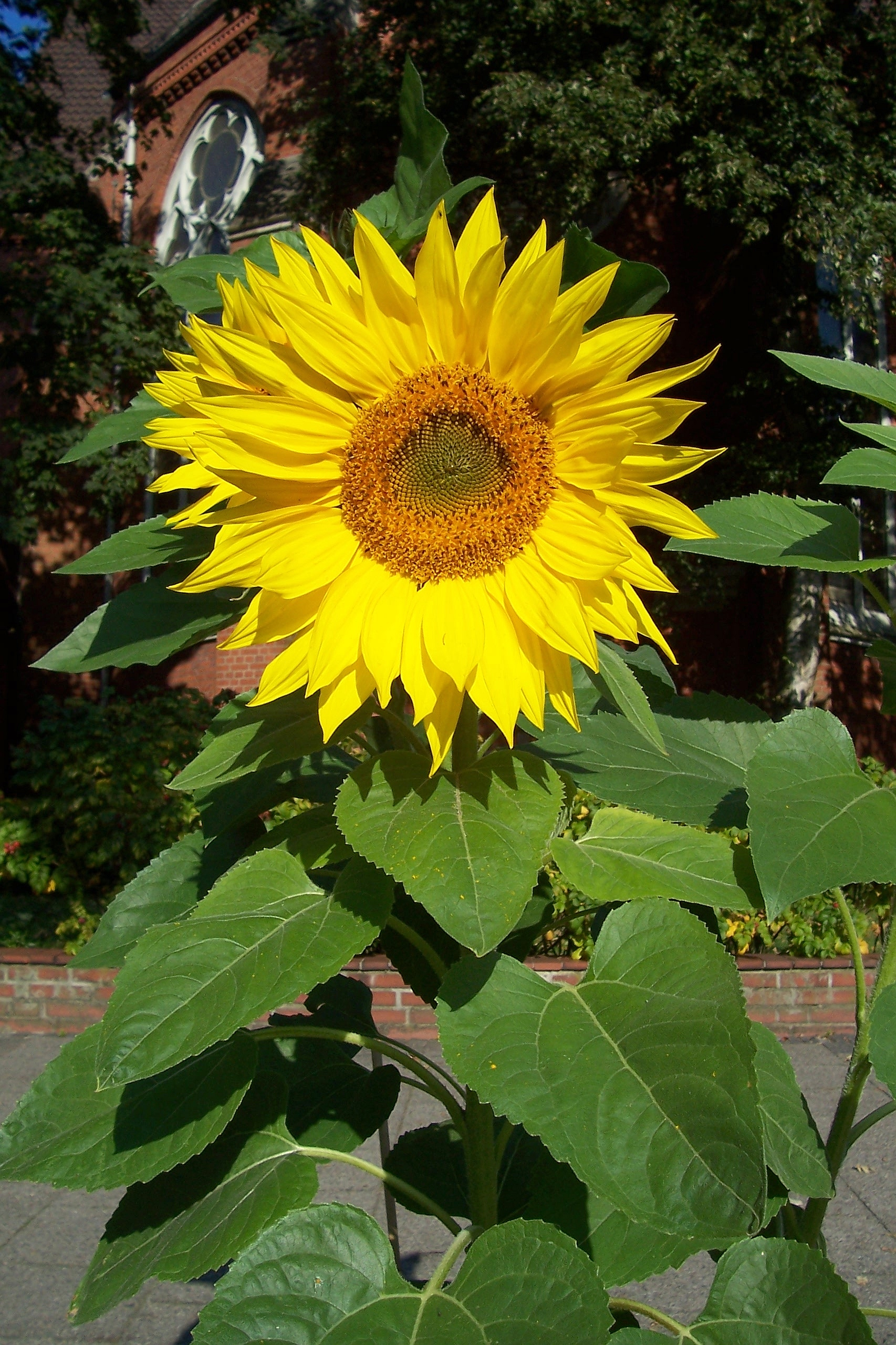 Sonnenblume, Bremerhaven